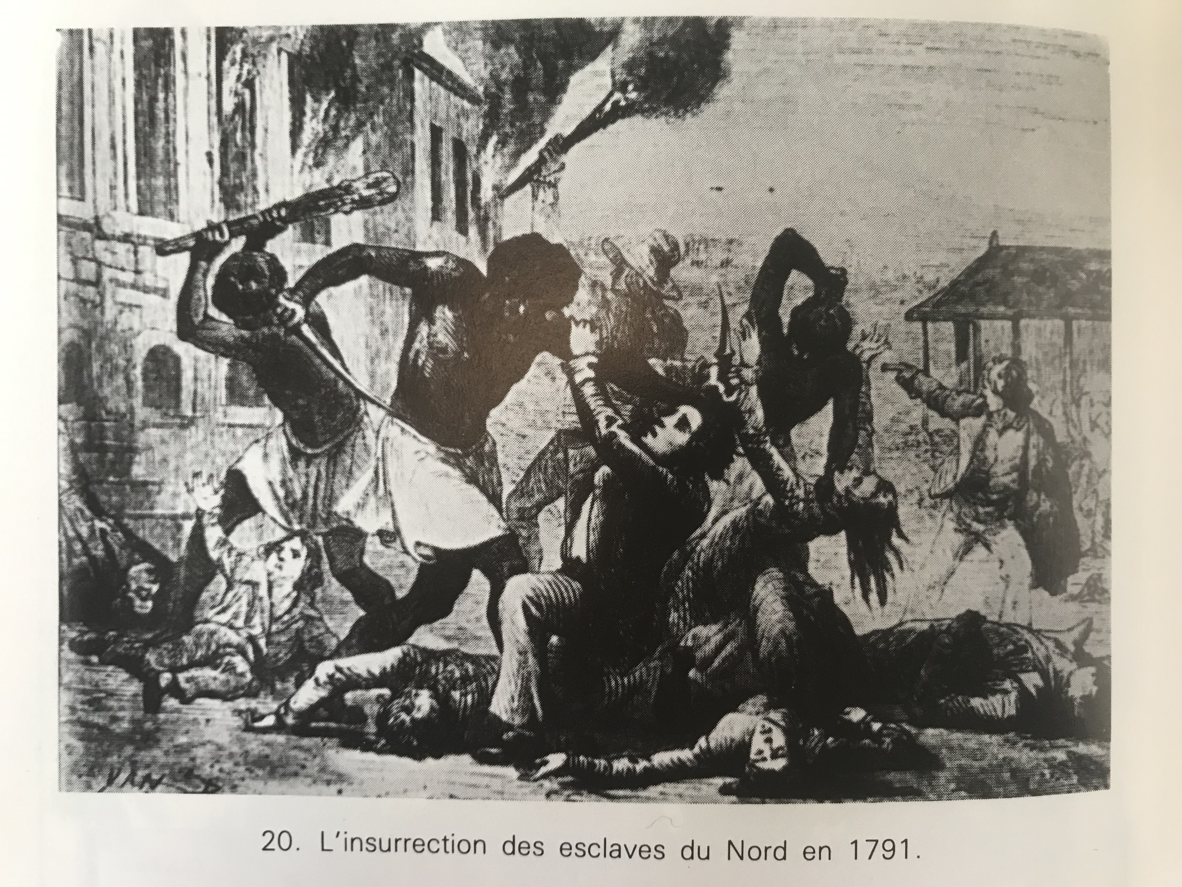 L'insurrection des esclaves du Nord en 1791